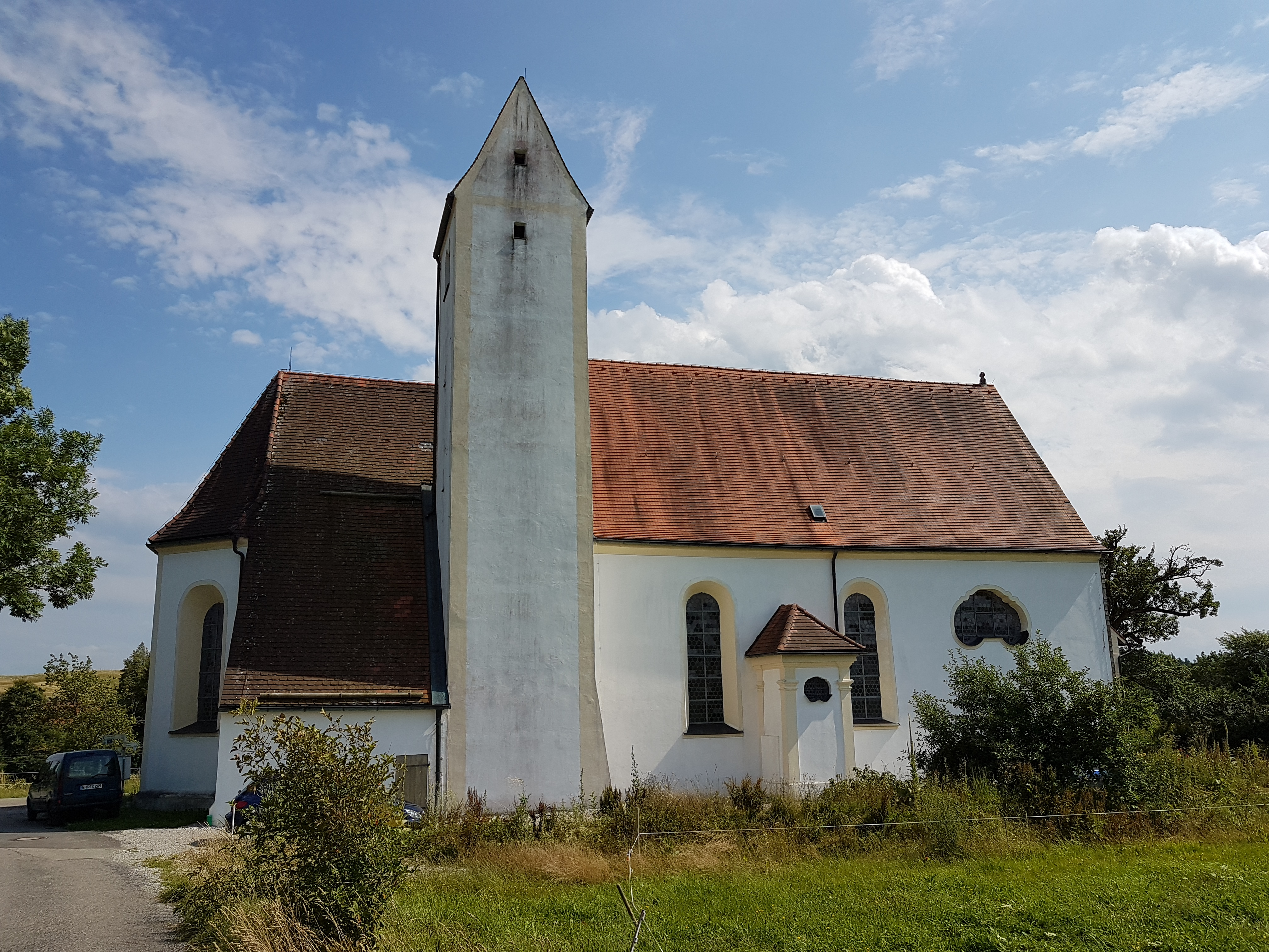 Bruggen, Filialkirche St. Anna